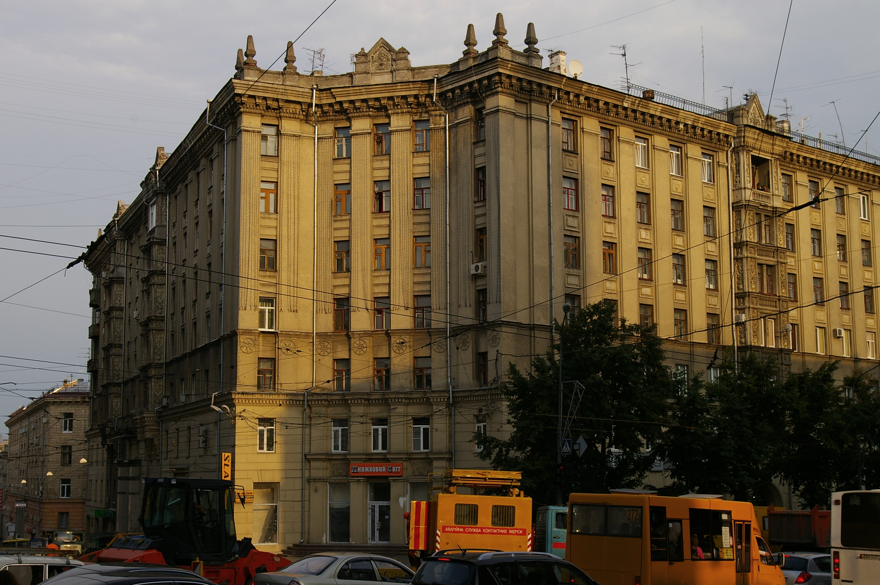 Харьков